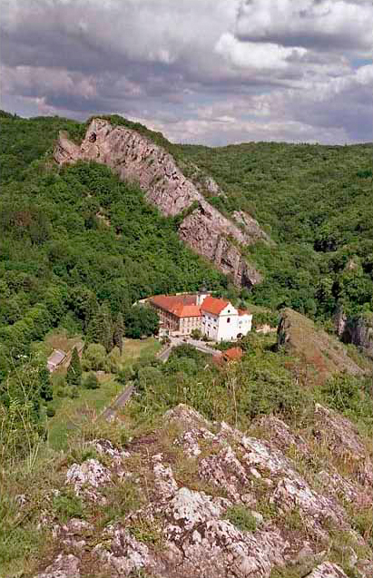 fotografie z mého archivu obce Svatý Jan pod skalou a Svatojánské skály